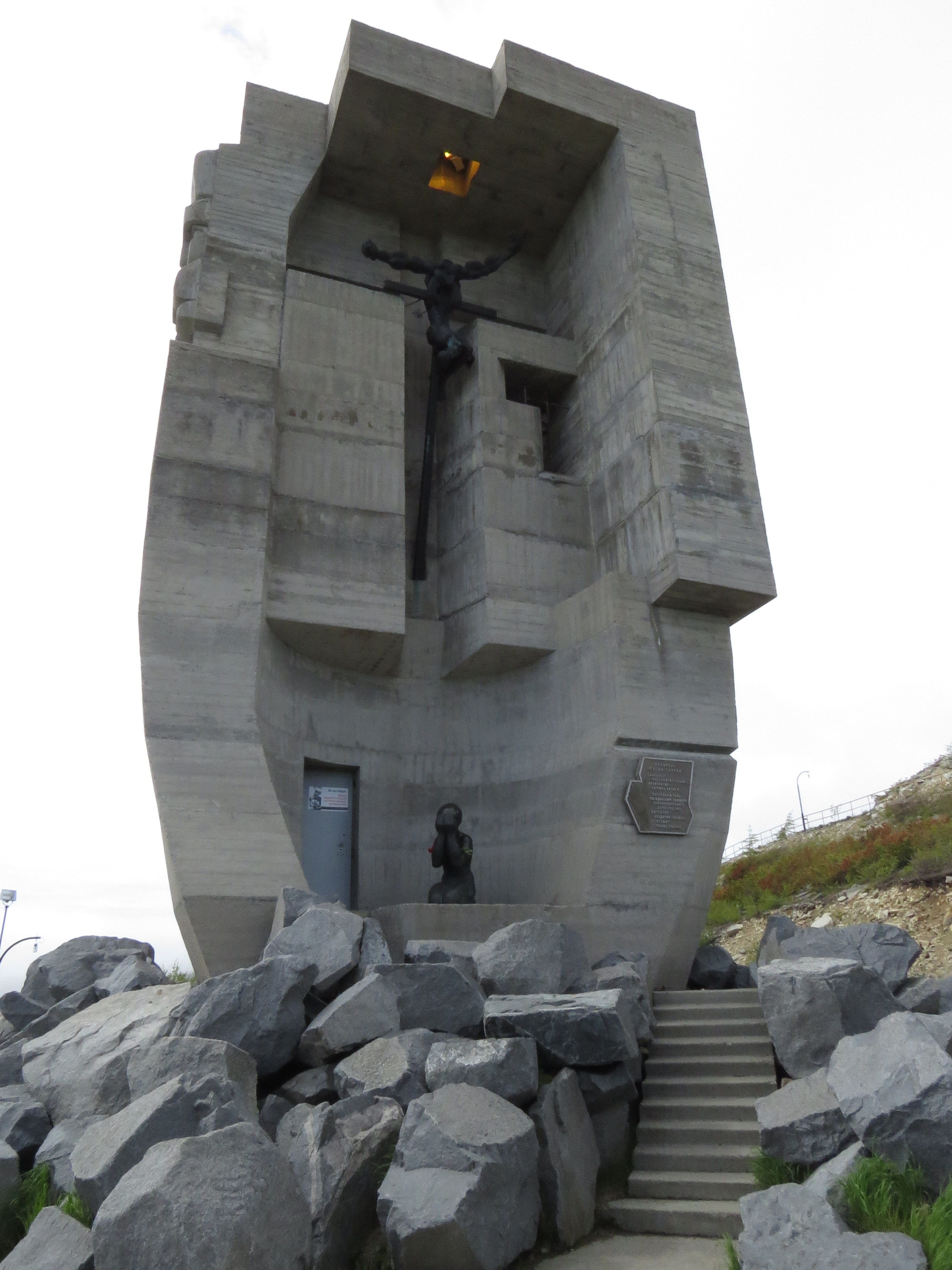 Мемориальный комплекс жертвам политических репрессий «Маска Скорби»: сопка Крутая, Магадан, Магаданская область